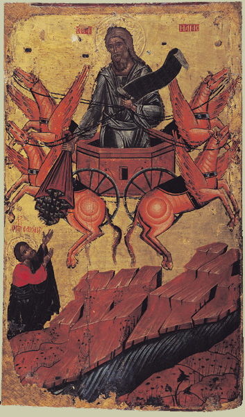 Вознесение Пророка Илии. Болгария. Первая половина XVII века. Дерево, темпера. 89 х 52,5 см.